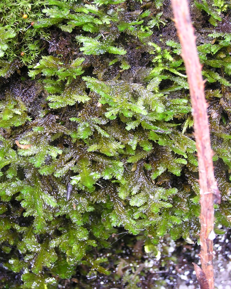 Neckera crispa, aufgenommen bei Hallstatt in Österreich.